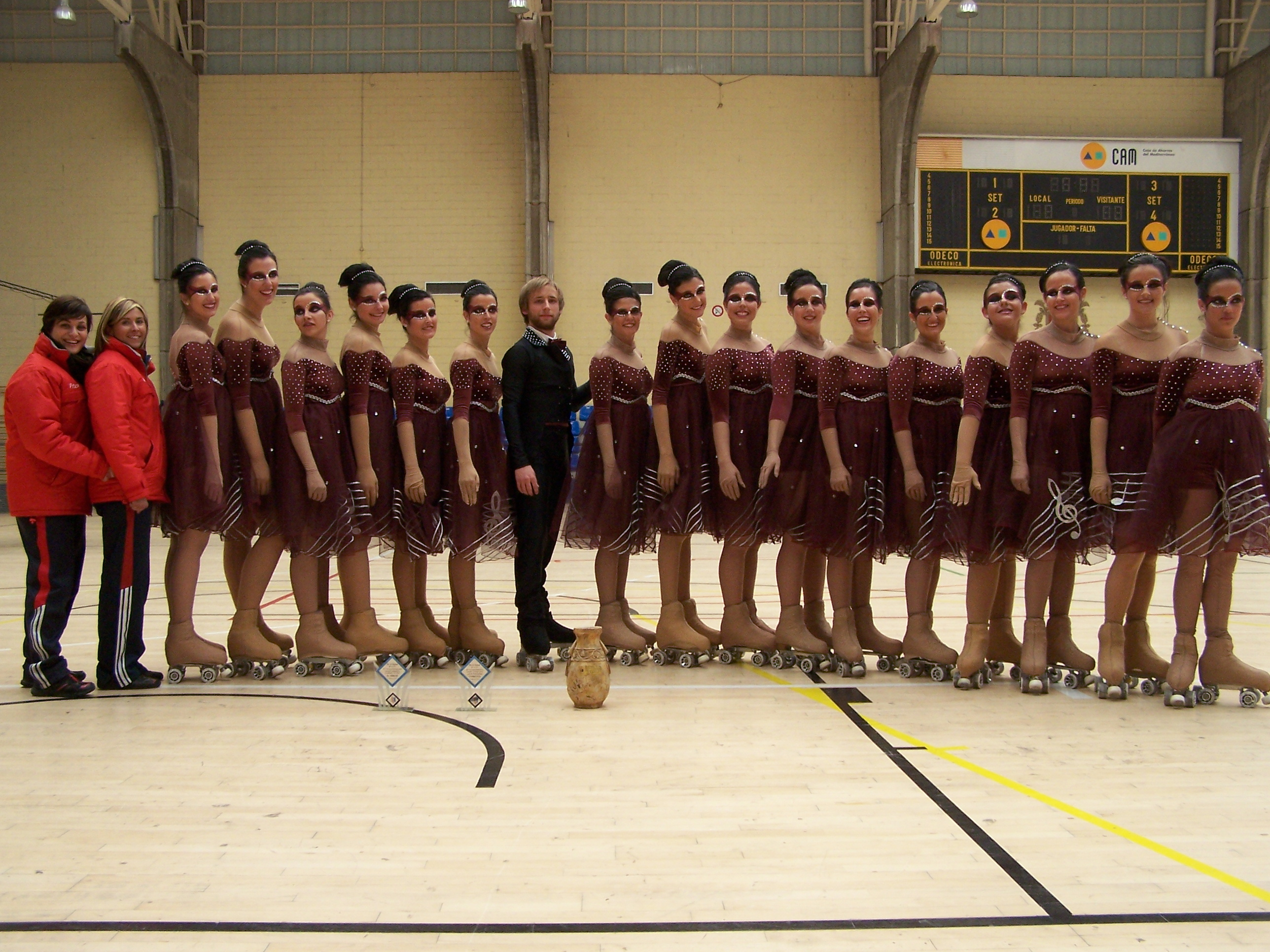 Campeonas Autonómicas de patinaje artístico 2012.